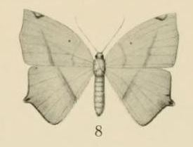 Thinopteryx) Epigynopteryx africana (Aurivillius 1910) aus: Aurivillius, 1910. Sjöstedts Kilimandjaro-Meru Expedition